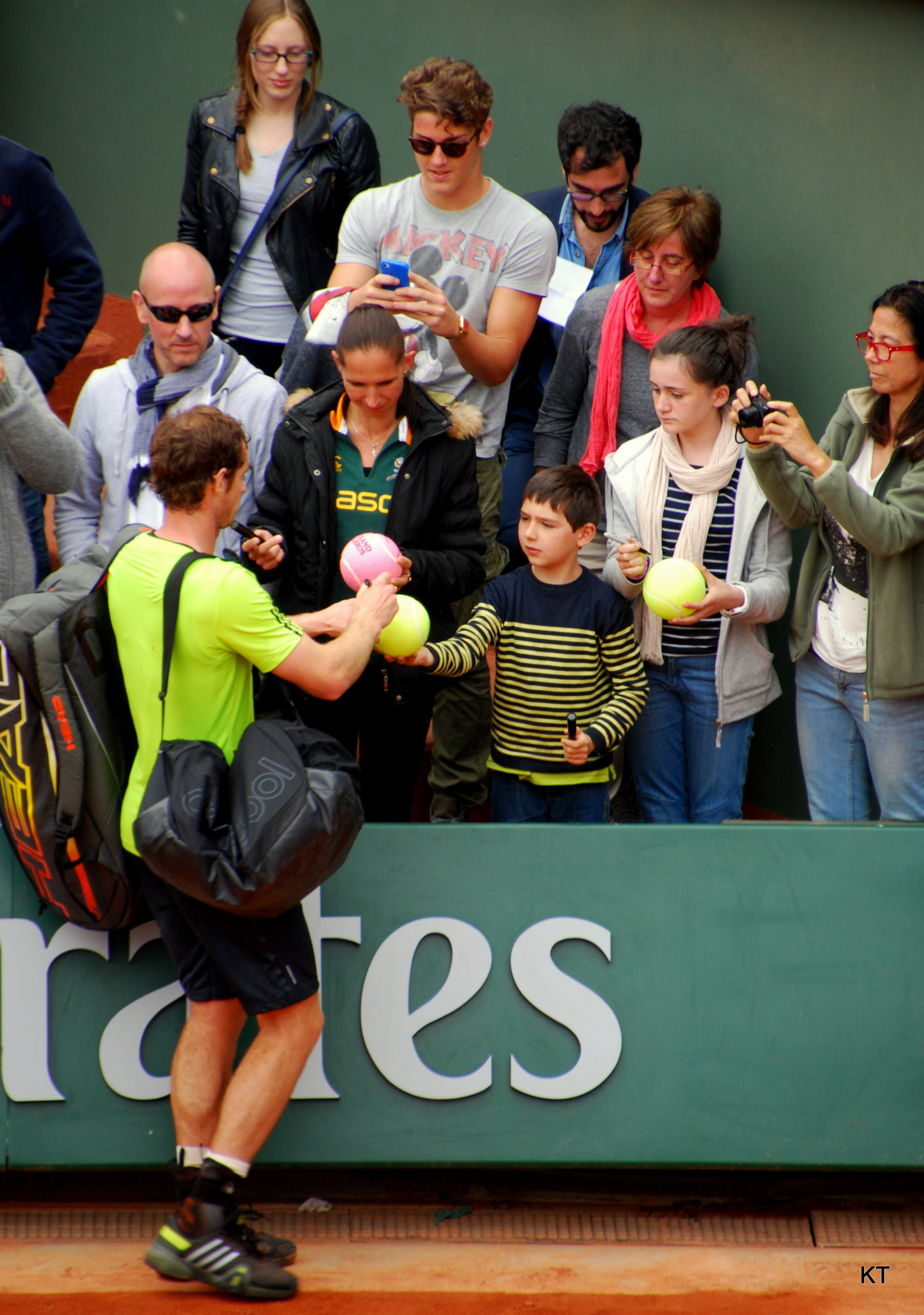 Andy signs autographs